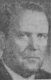 Arkitekten Helge Barkenius